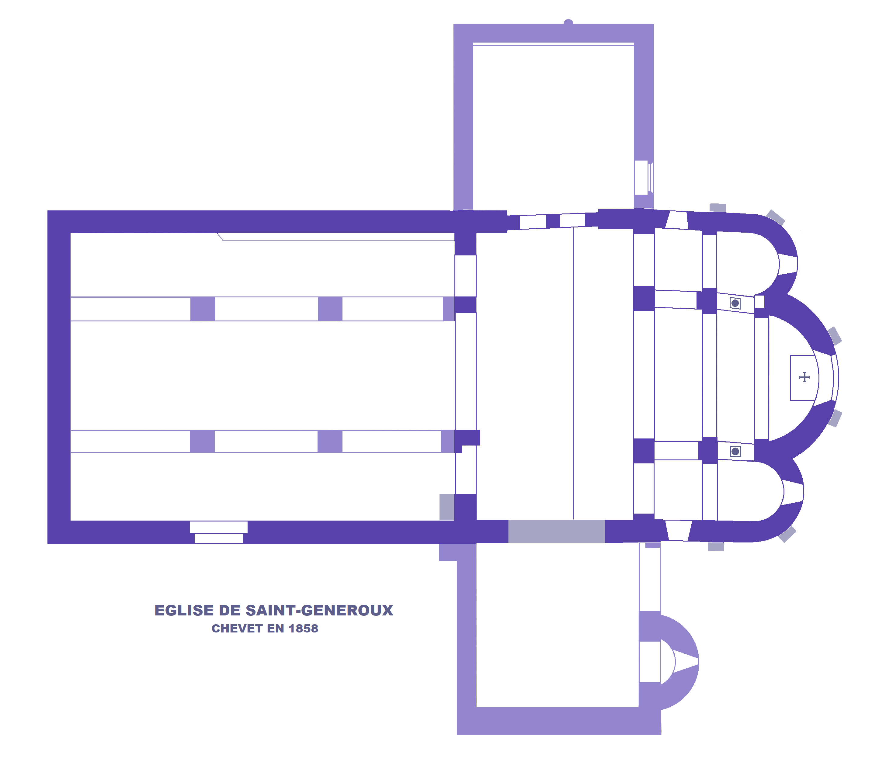 Eglise de Saint-Généroux, Plan en 1858